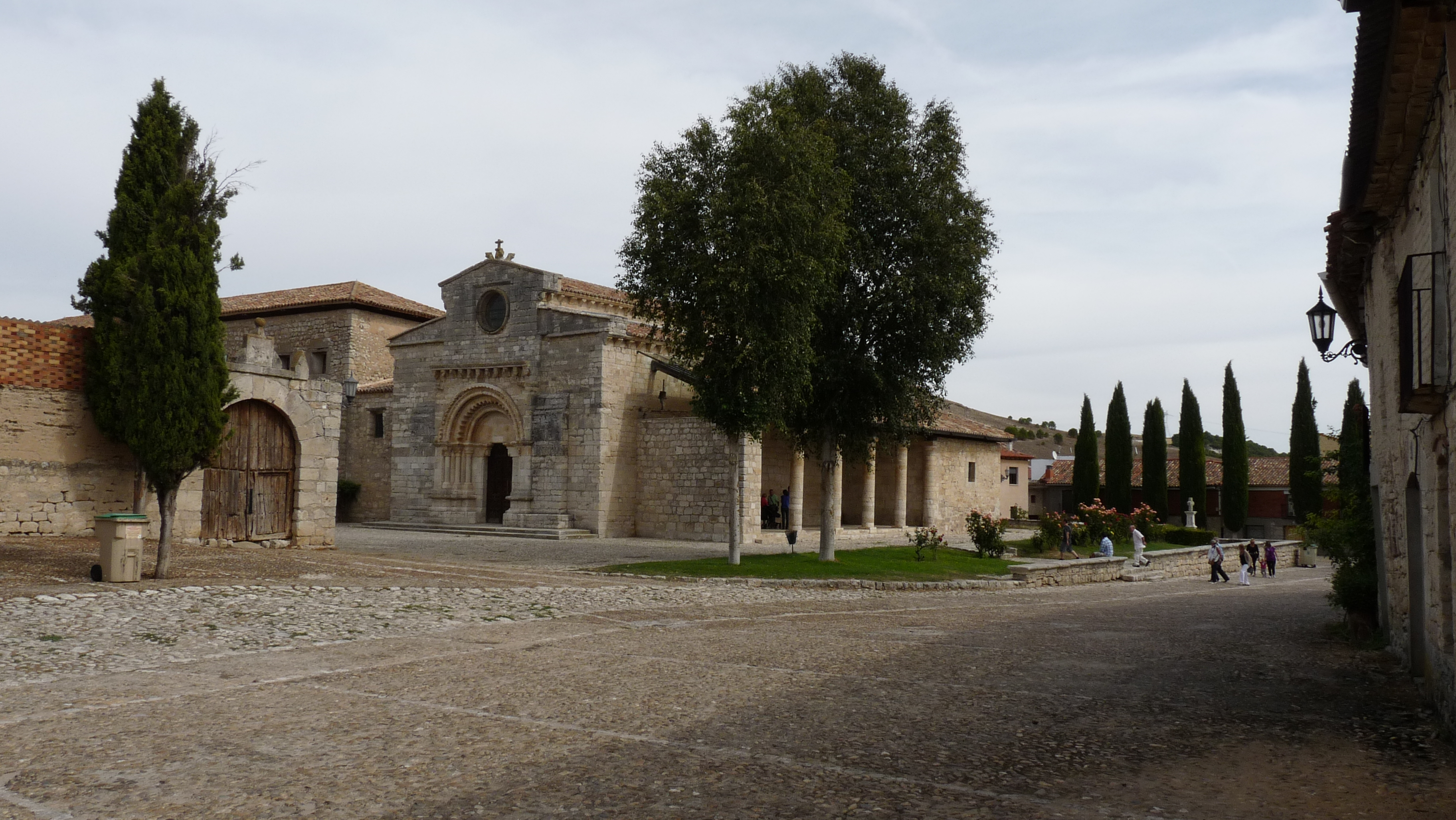 Vista de la Iglesia mozarabe de Santa Maria de Wamba, en Wamba, Valladolid España